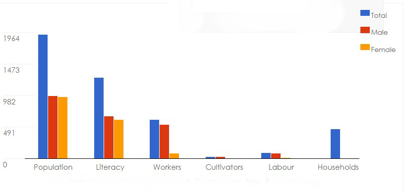 জনসংখ্যা, সাক্ষরতা, শ্রমিক ও পরিবার সম্পর্কিত পাইকপাড়া বারচার্ট